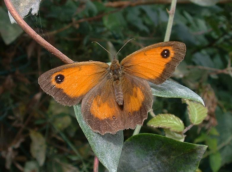 Amaryllis (papillon), Talmont-Saint-Hilaire, juillet 2004